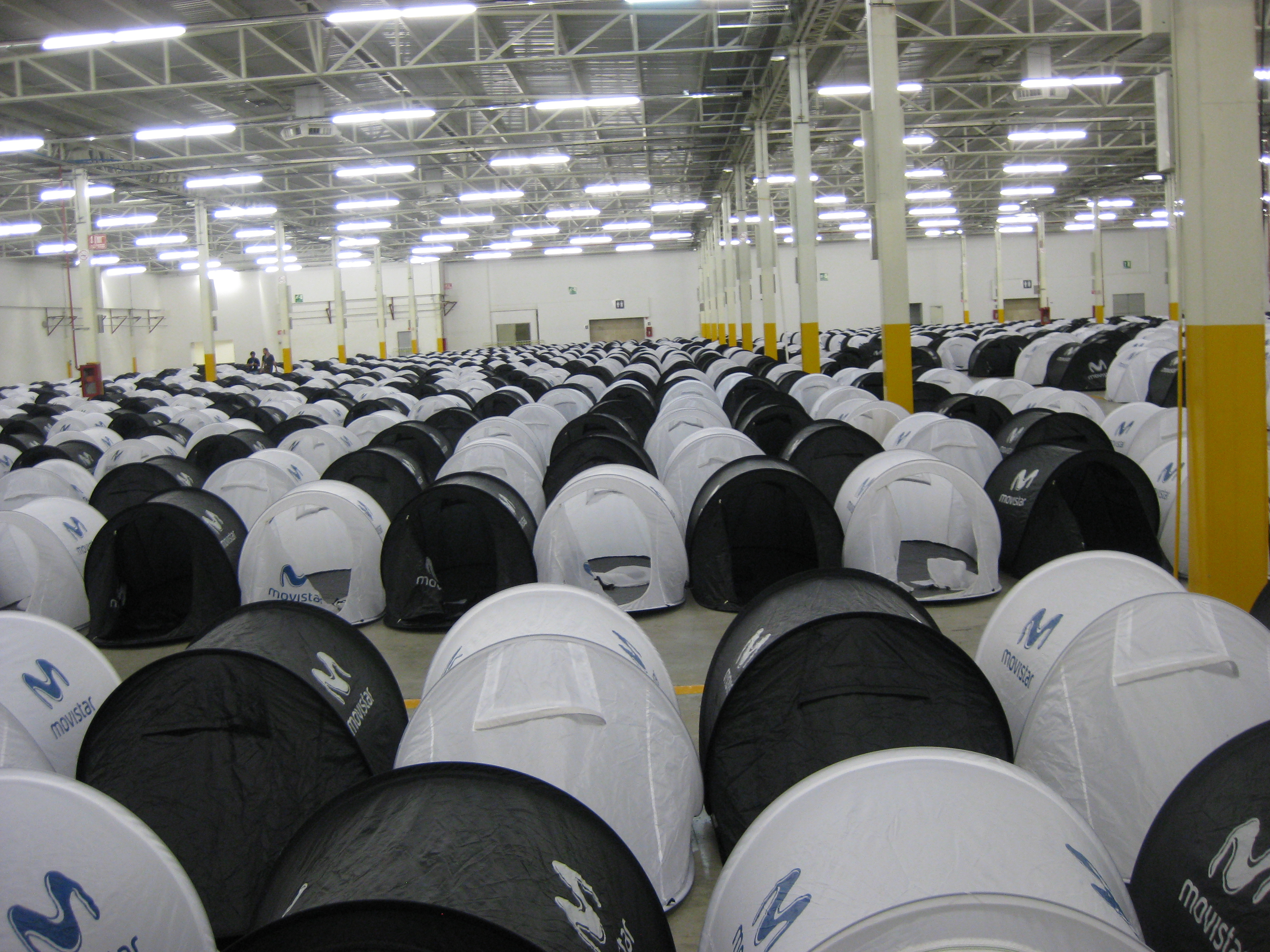 Zona de acampada en Movistar Campus Party 2014 (CPMX5)